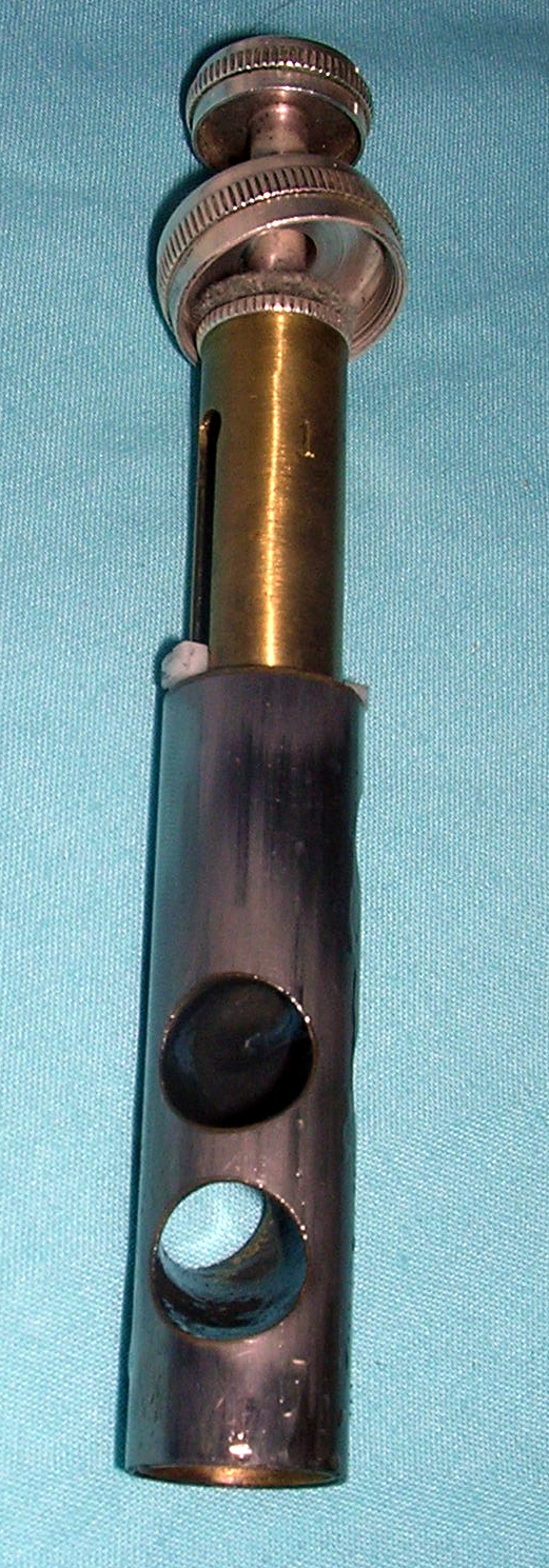 שסתום של חצוצרה.